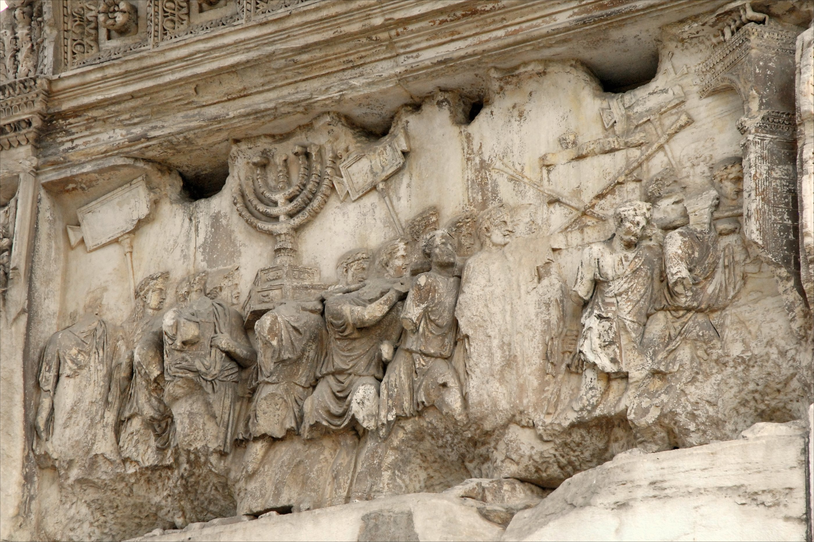 Le butin de la guerre contre les Juifs L'arc de Titus est à l'entrée du Forum Romain sur la Via Sacra. L'arc a été élevé à l'époque de Domitien pour célébrer la conquête de la Judée par Titus en 70. Les reliefs à l'intérieur de l'arc représentent la procession triomphale : - à gauche, le quadrige de l'Empereur victorieux - à droite, les soldats portant les trésors du Temple de Jérusalem : le candélabre à sept branches, les trompettes d'argent, la planche pour le pain, etc. (voir photo) Titus était le fils de Vespasien, il a été empereur de 79 à 81. Articles de Wikipedia sur l'arc de Titus et sur la conquête de la Judée